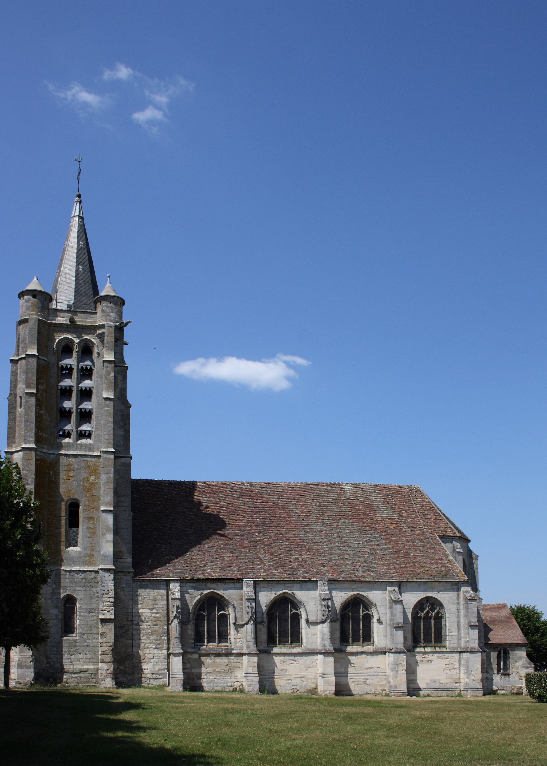 Katholische Kirche Saint-Martin in Survilliers, einer Gemeinde im Canton de Luzarches (Île de France), Ansicht von Süden